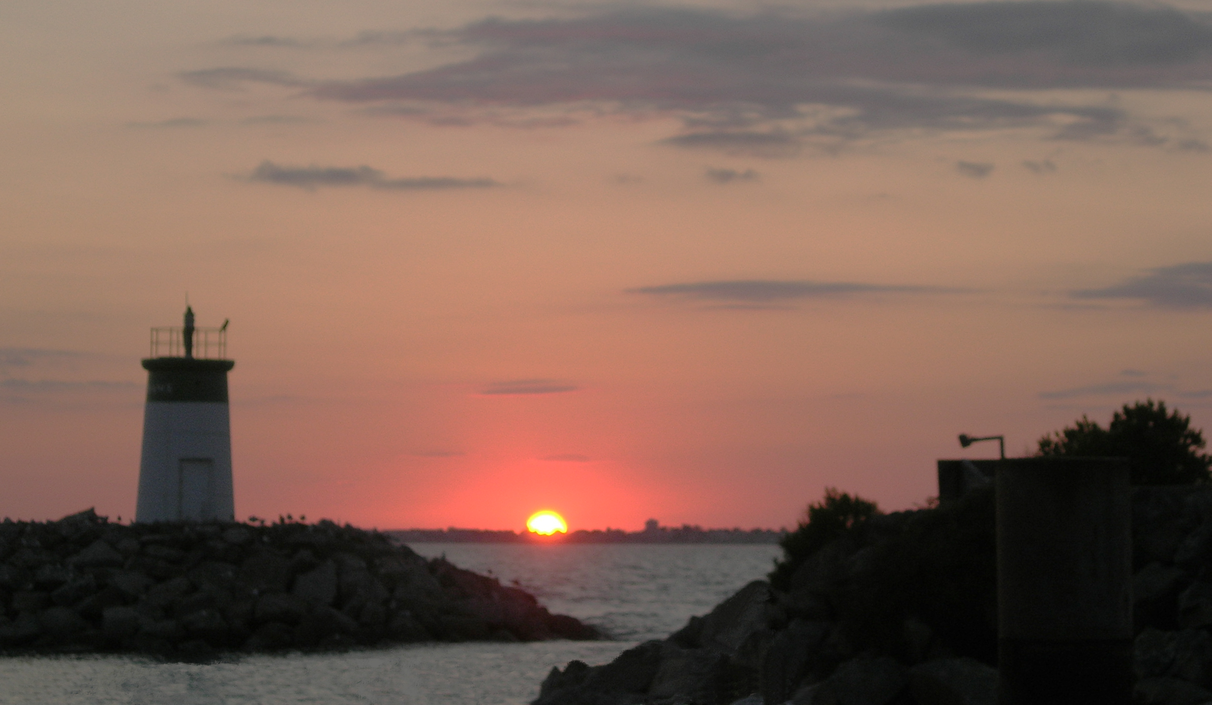 Coucher de soleil sur l'entrée du port de Pornichet